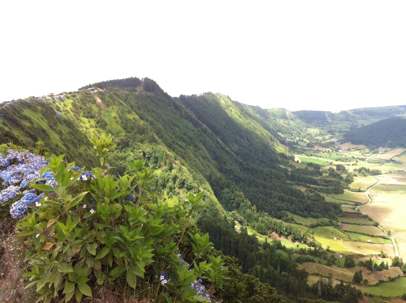 Bonita vista de la ladera boscosa del crater, coronada con hortensias y tapizada de criptomerias de hasta 10 m. de altura